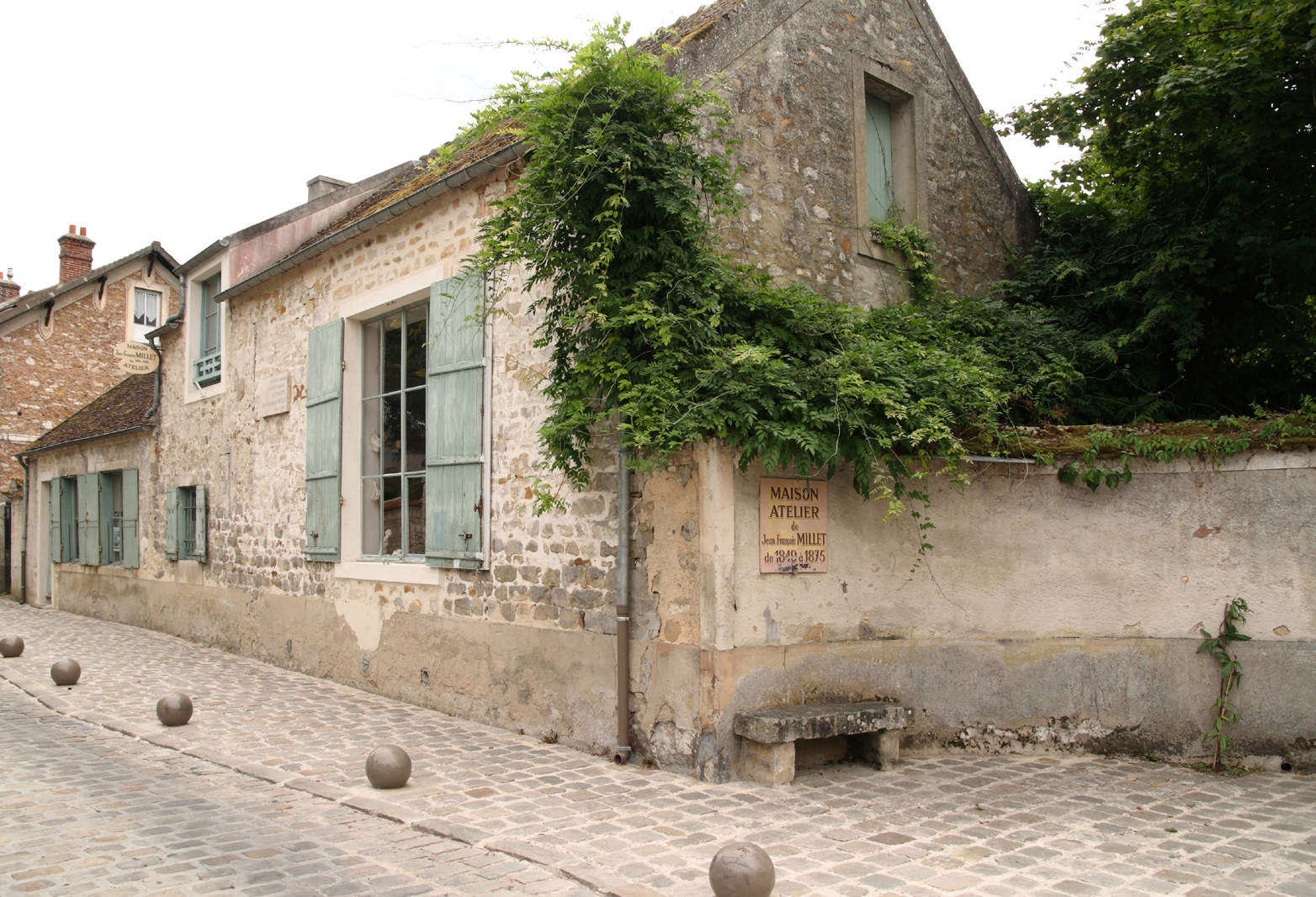 Atelier de Jean-François Millet à Barbizon